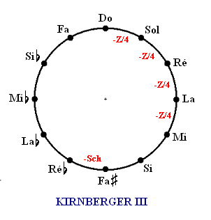 Tempérament de Kirnberger III Gerard